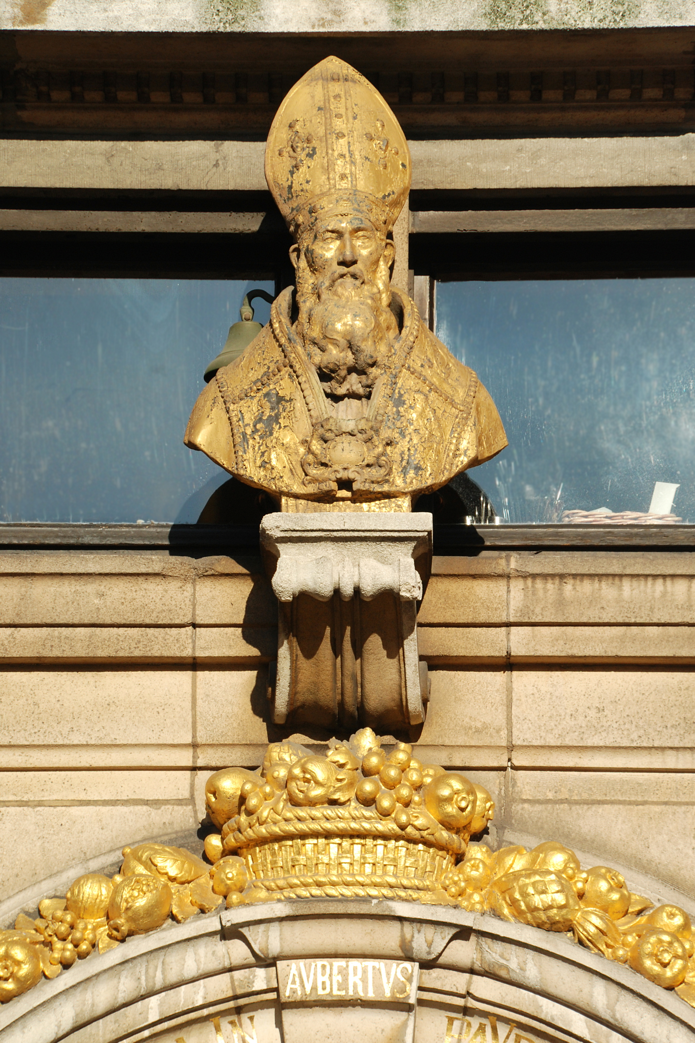 Belgique - Bruxelles - Grand-Place - Maison du Roi d'Espagne